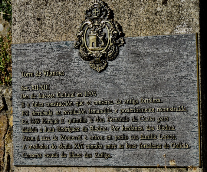 son muchos los detalles a apreciar...